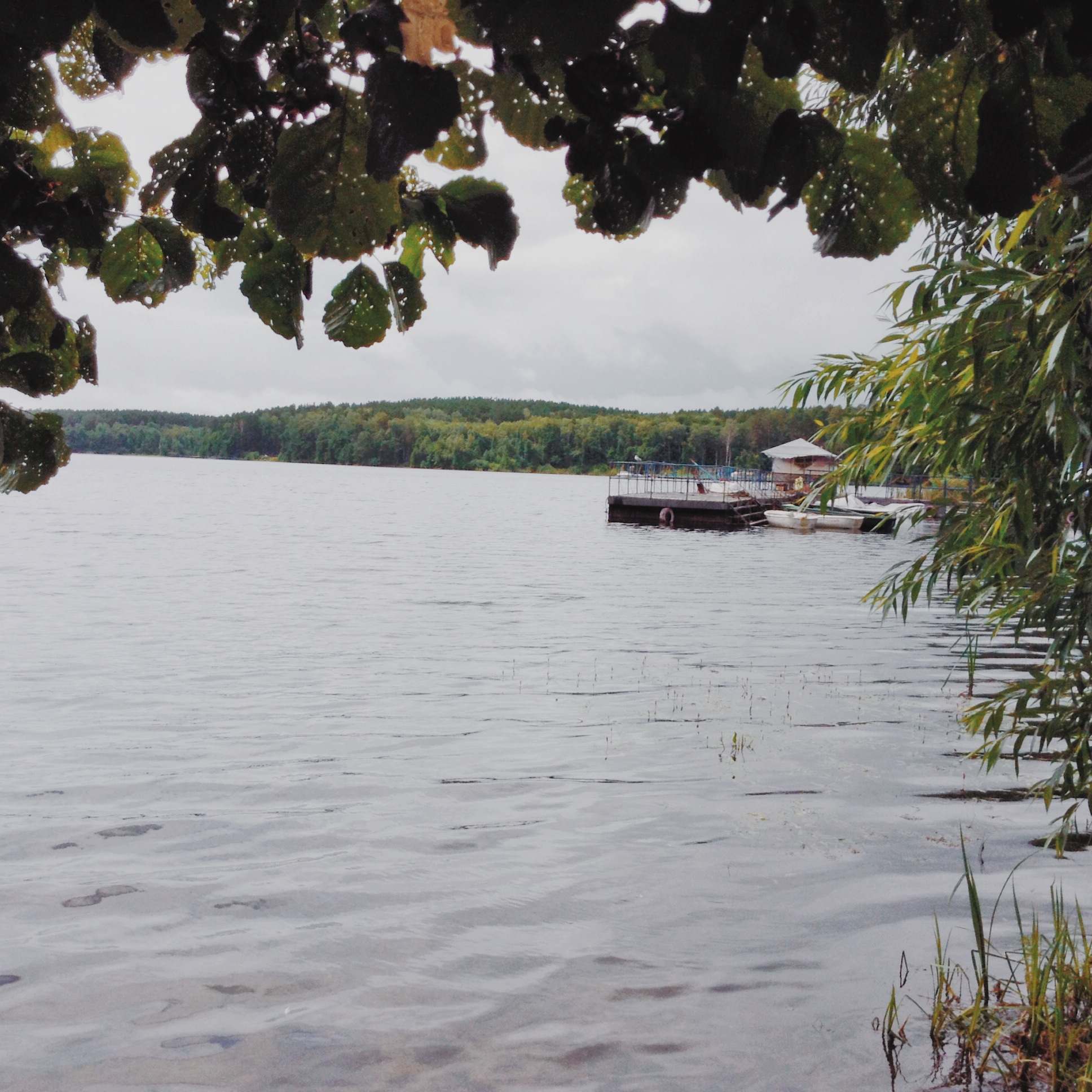 Еловое озеро, Чебаркульский район. This image is related to the protected area of Russia number 7410303